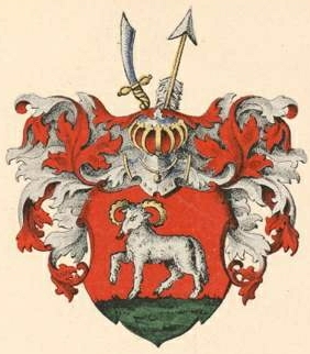 Baranoffi suguvõsa aadlivapp